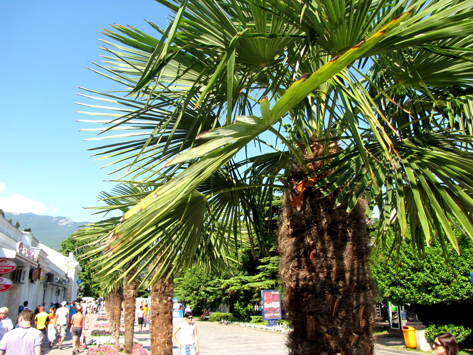 Пальмы на набережной им Ленина в Ялте